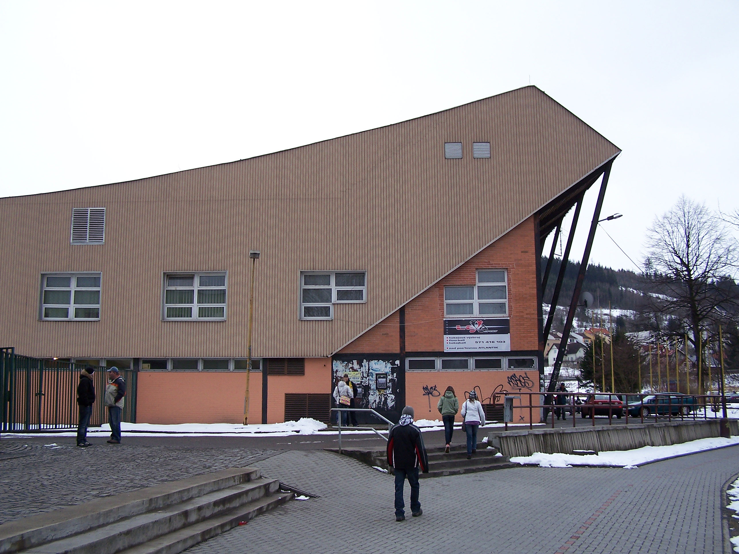 Zimní stadion Na Lapači, home arena of VHK Vsetín in Vsetín, Czech Republic